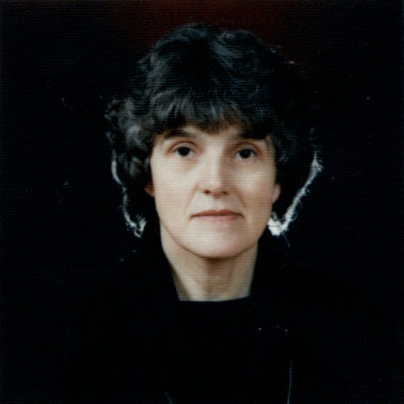 Emma Freisinger, ehemalige österreichische Leprakrankenschwester in Korea